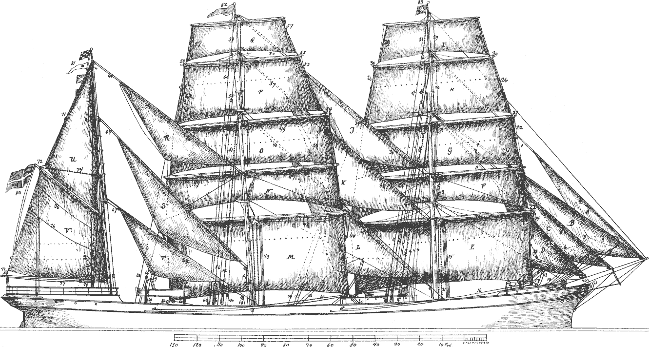 Rt Barksskibs løbende gods (ender), set fra agterkanten af sejlene